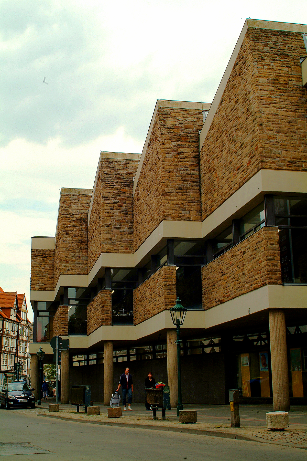 Sie haben ein besseres Bild? Sogar ein historisches Dokument als Bild(ungsförderung)? Zeigen Sie' s uns. Stiften Sie es Ihren Kindern, unseren Enkeln, allen Menschen. Hier.